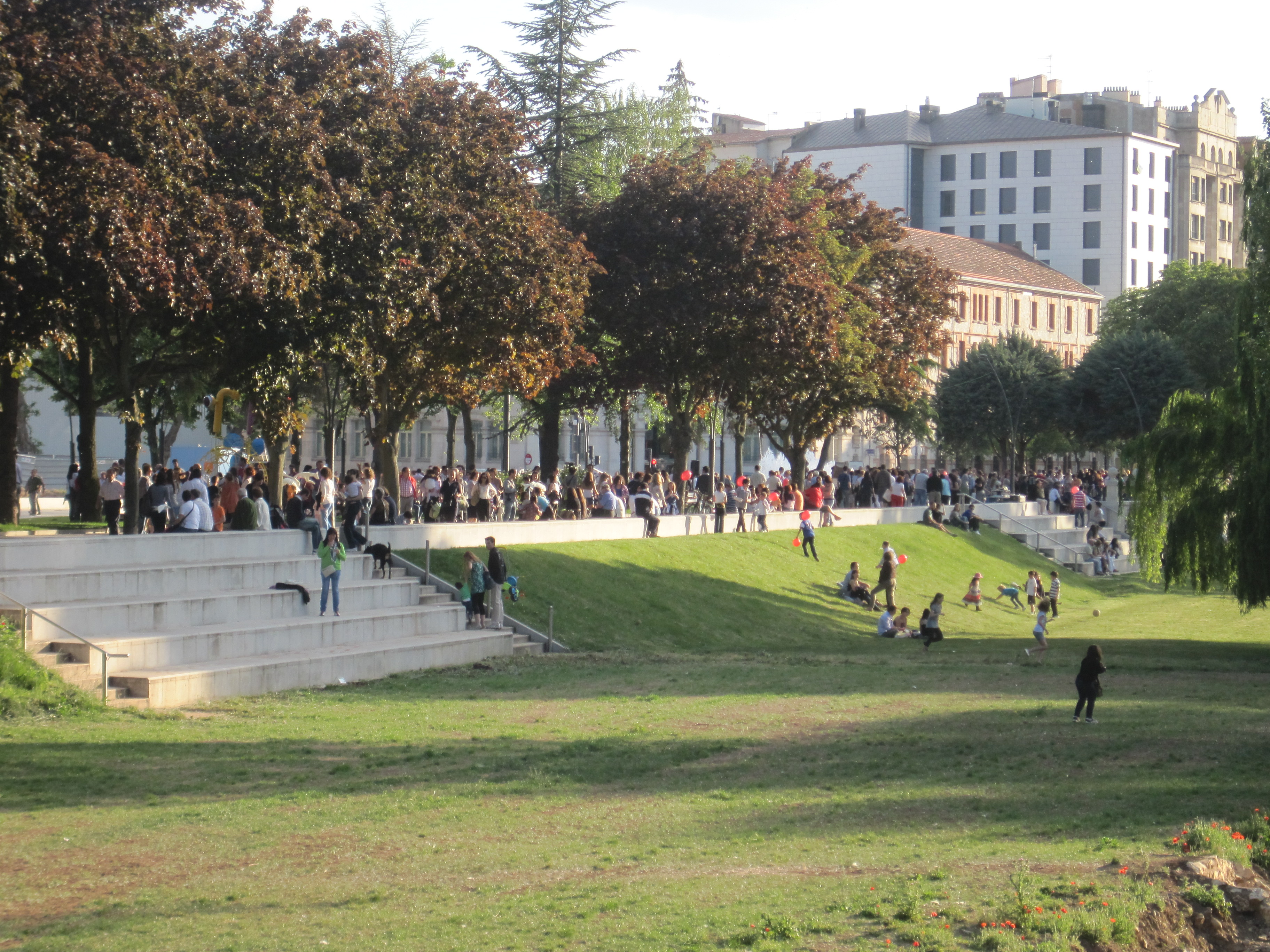 Escaleras hacia el Arlanzón, formando el parque lineal.